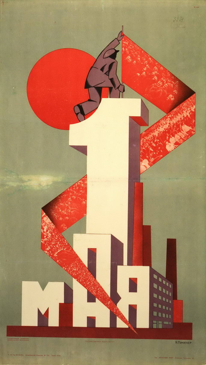 Плакат "1 мая"